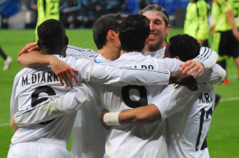 19-12-09 Estadio Santiago Bernabeu, Real Madrid 6 - Zaragoza 0